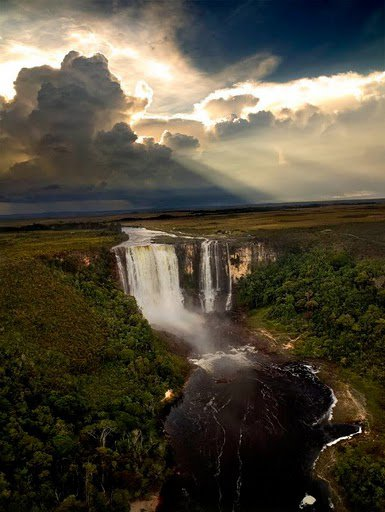 atardecer sobre el salto tarota tomado desde un vuelo en cesna222